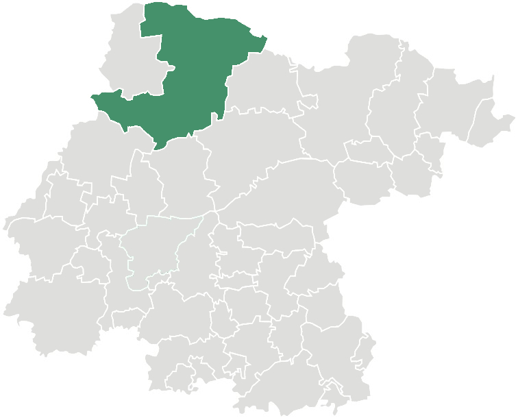 Ubicación del municipio de San Felipe en el Estado de Guanajuato, México.